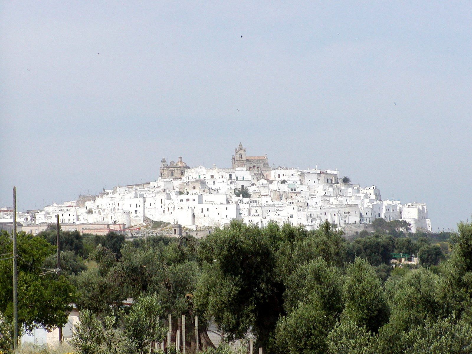 Ostuni in Puglia Italy